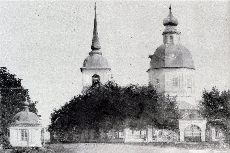 Храм Николая Чудотворца в Новоржеве Псковской губернии. Не сохранился. Дореволюционная фотография.